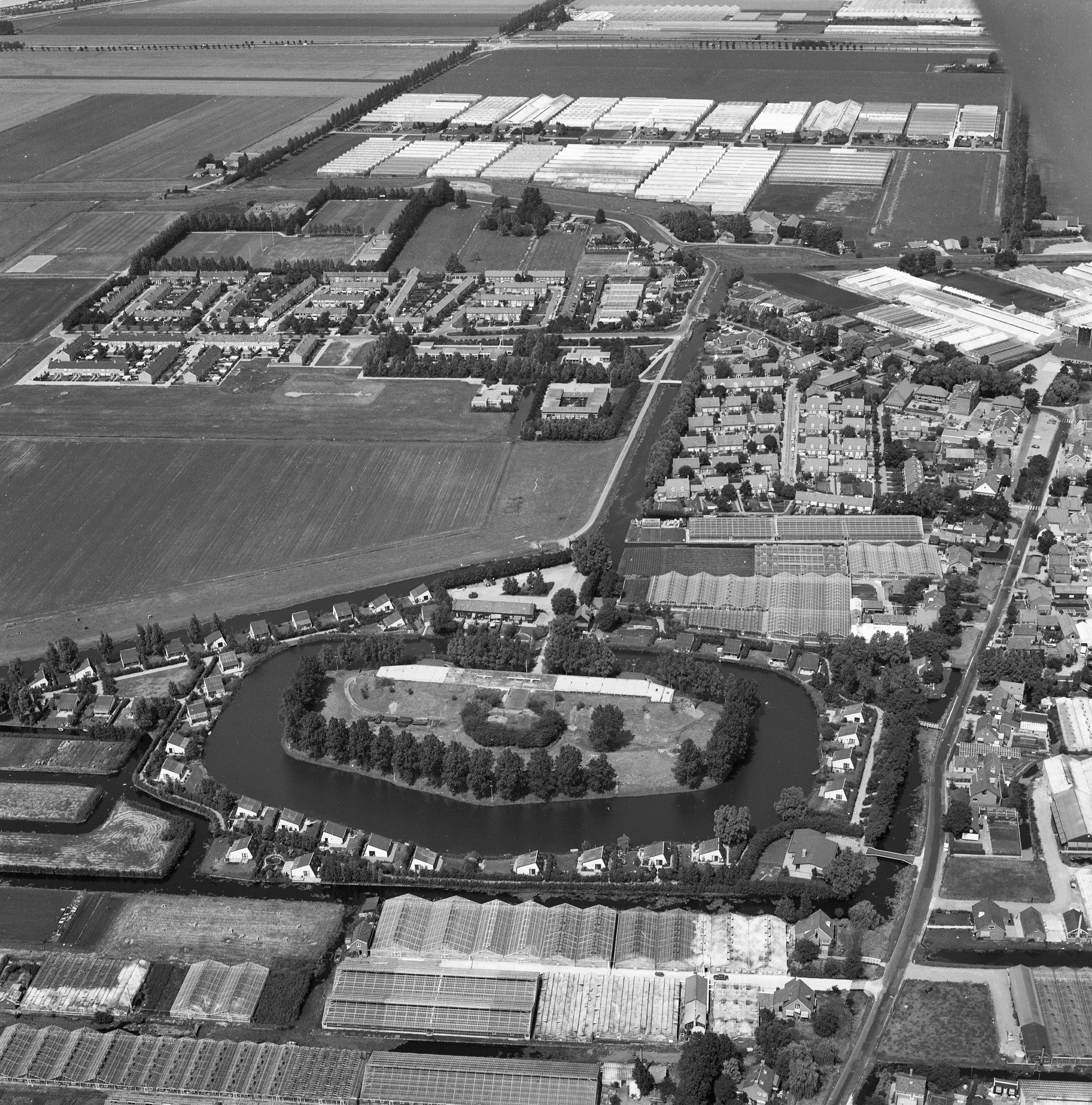 Overzichten: luchtfoto's